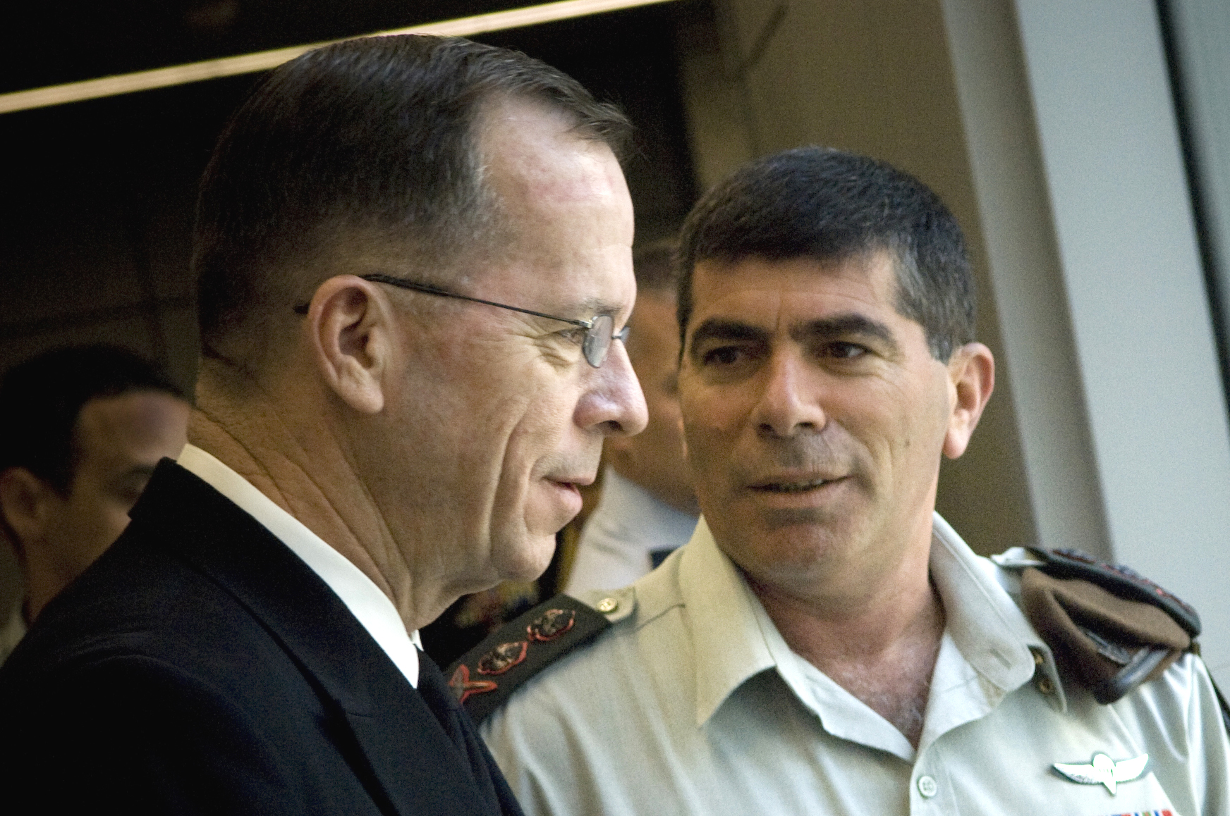 Mike Mullen and Gabi Ashkenazi